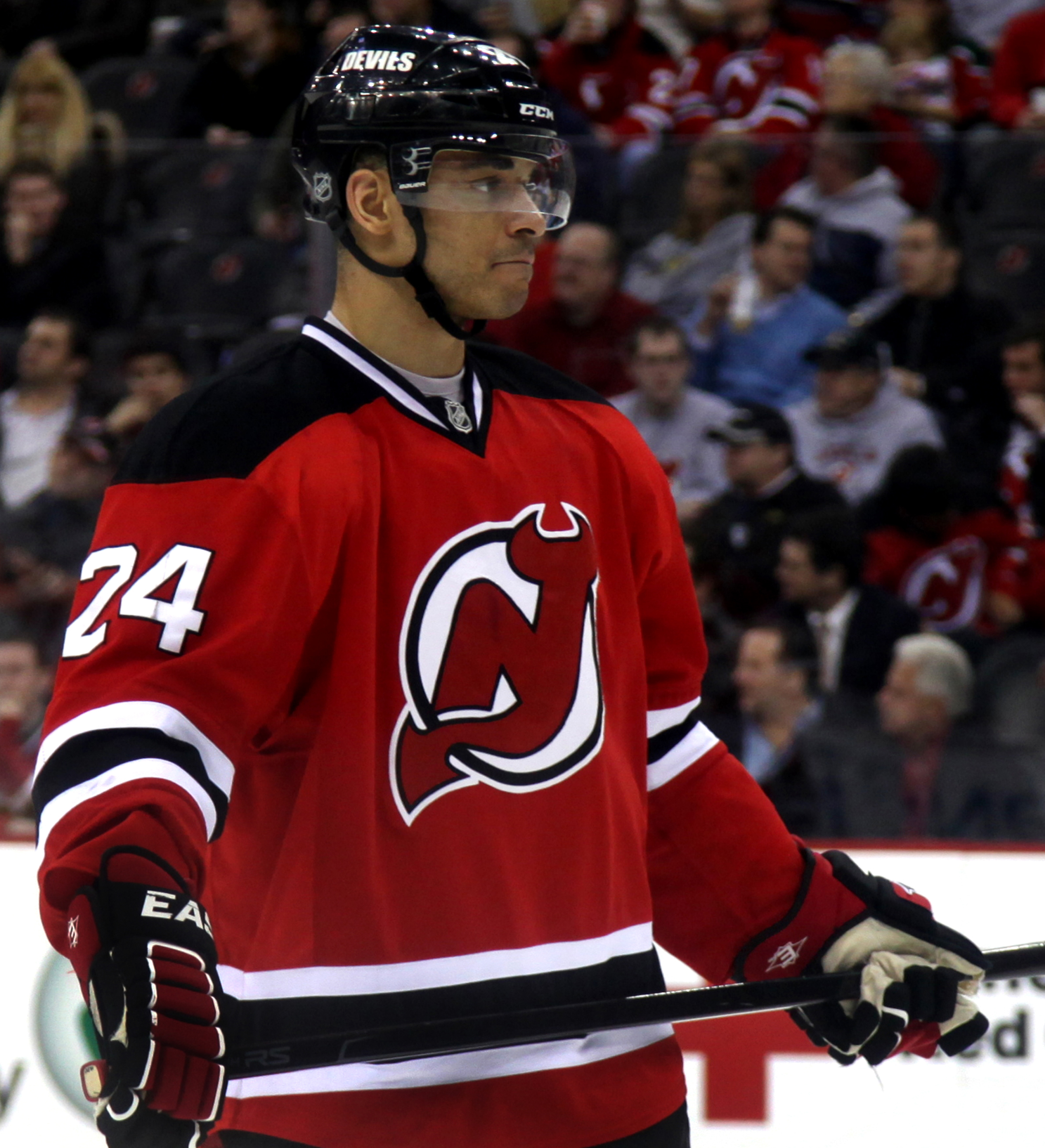 Salvador in 2012.